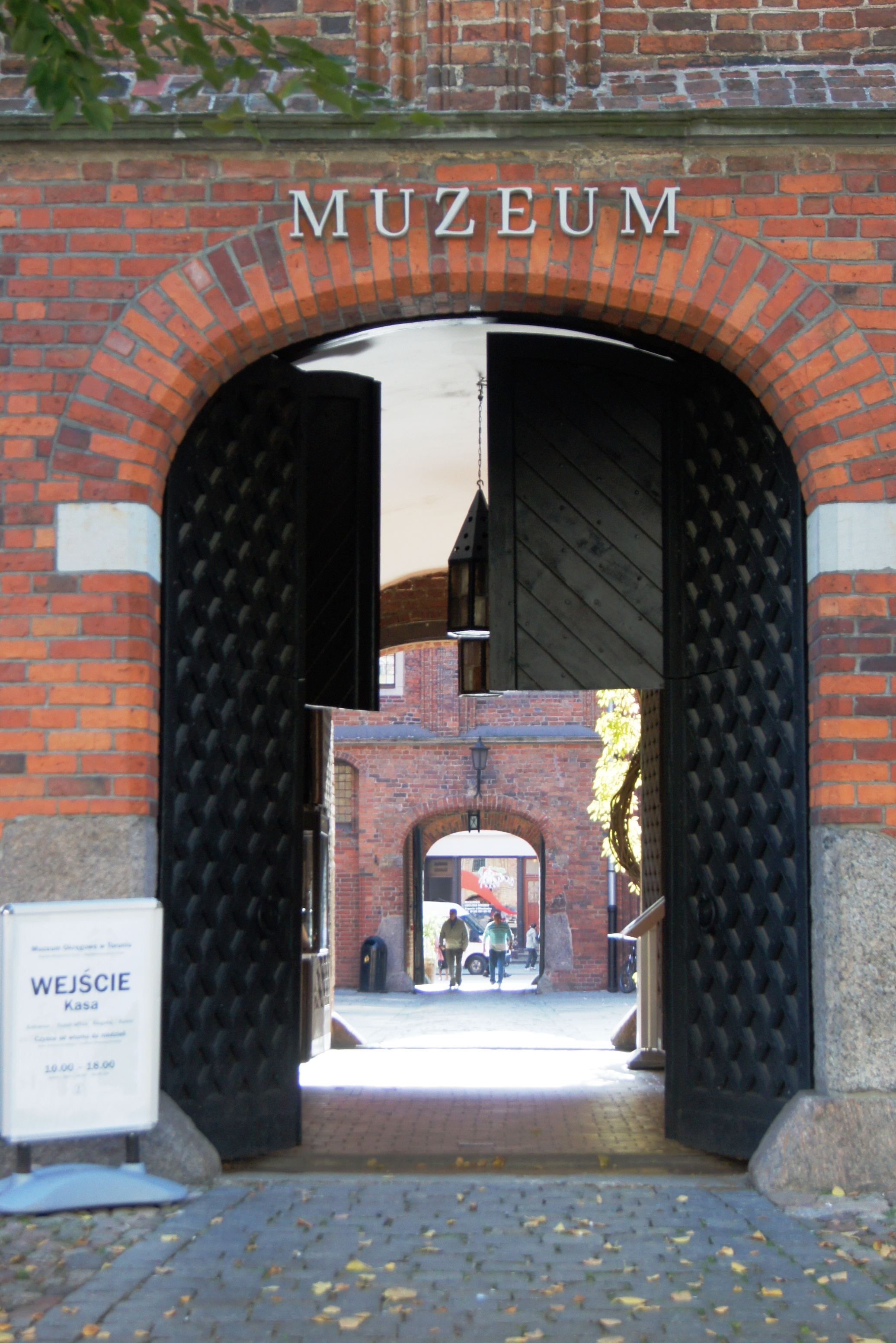 Toruń - ratusz staromiejski, XIII, 1391-1399, 1861 (zabytek nr rejestr. A/922)